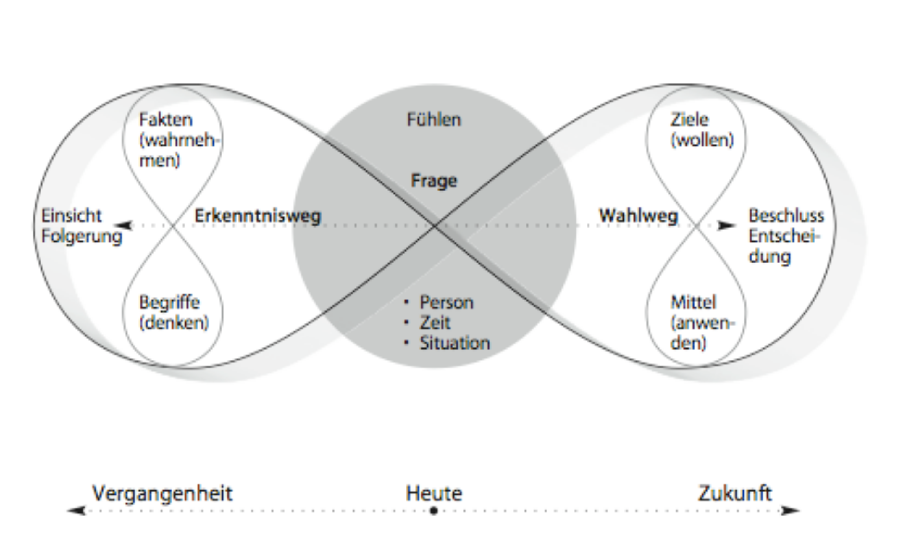 Dynamische Urteilsbildung als Modell dargestellt